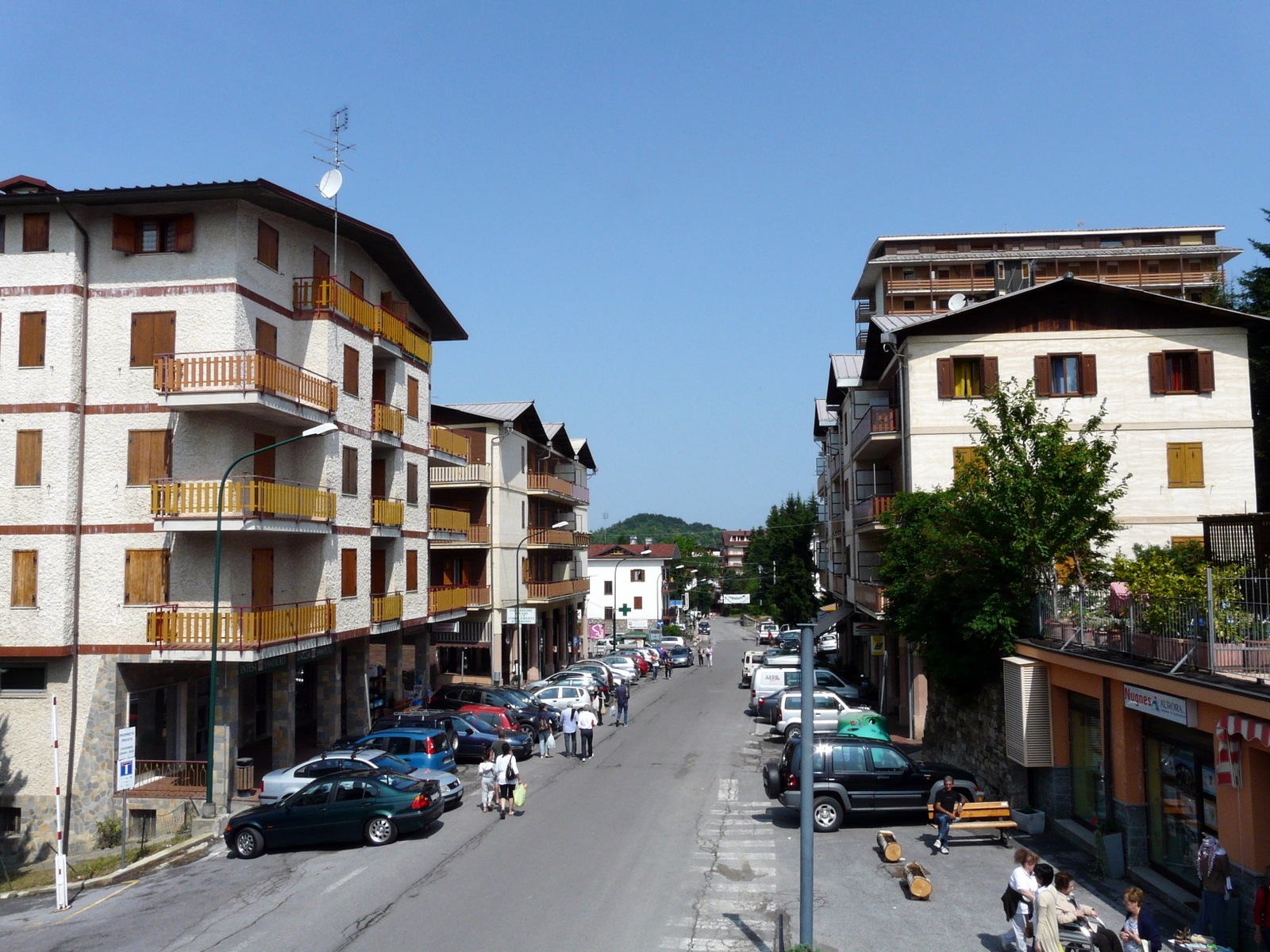 San Giacomo, Roburent, Piemonte, Italia